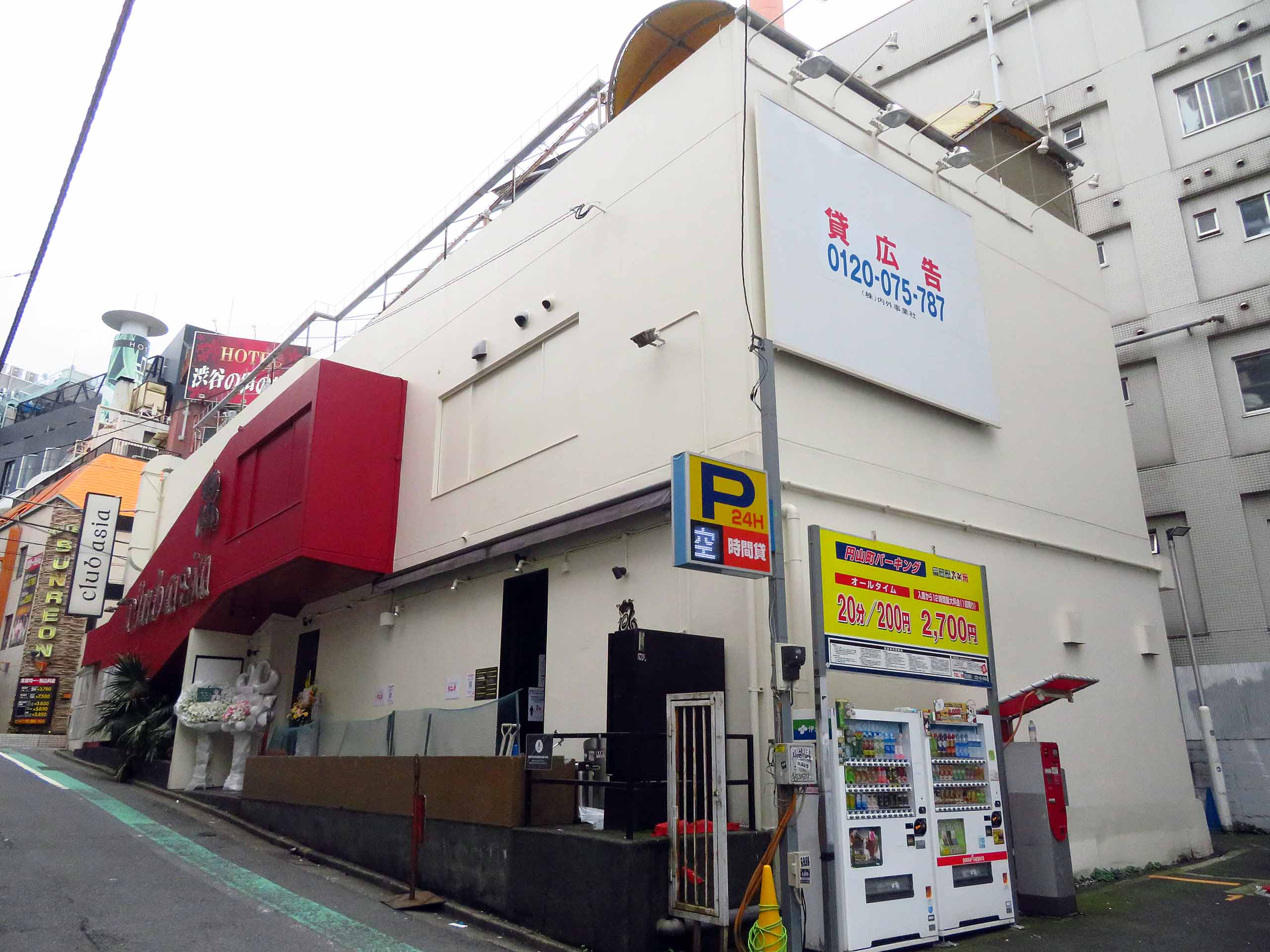 東急百貨店本店／bunkamura側から望むclubasiaの外観。向かいに運営会社カルチャー・オブ・エイジアおよびVUENOS、Glad、LOUNGE NEOが入居している第8矢澤ビル、坂を登ると道玄坂上交差点に至る。